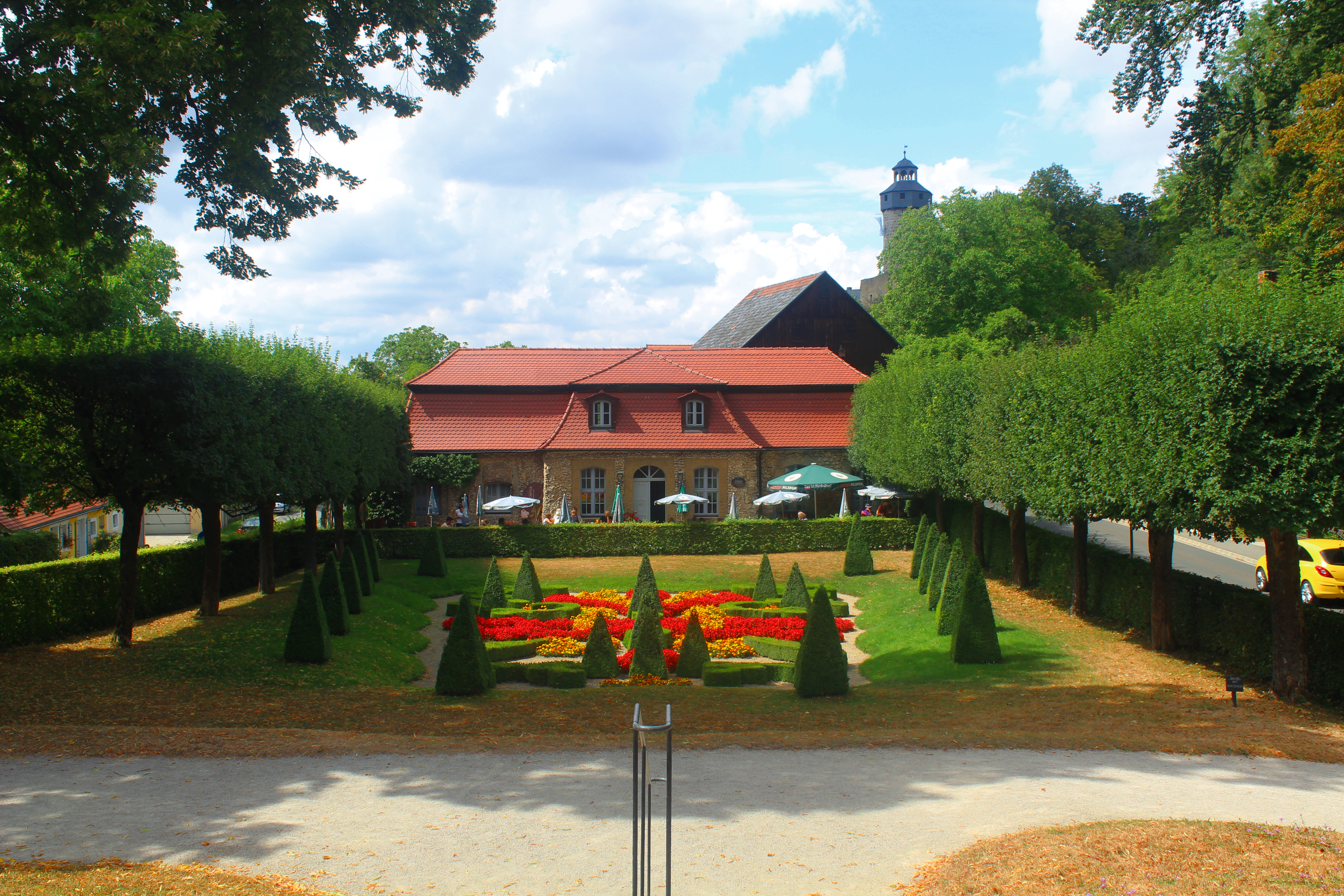 Park Schloss Sanspareil